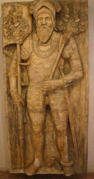 eigenes Foto von 2005 Uskokenführer Ivan Lenkovic Mewes